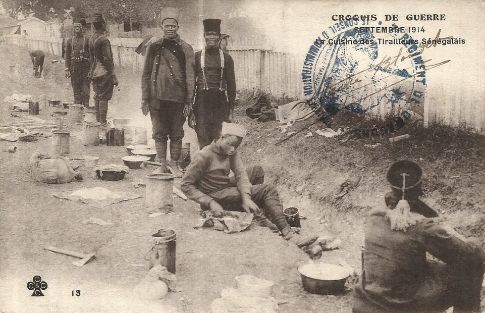 Tirailleurs sénégalais, cuisine, septembre 1914, "croquis de guerre"